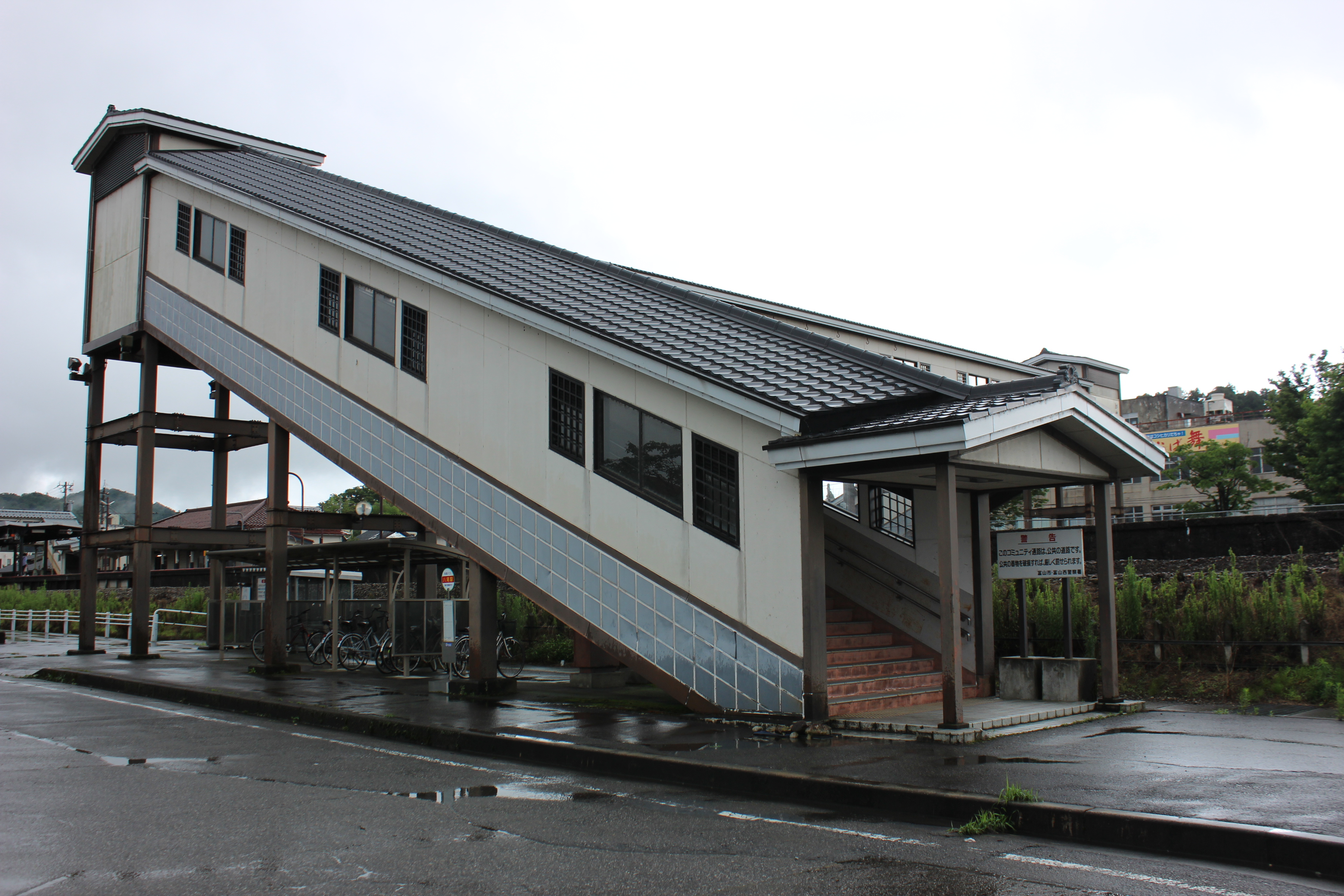 越中八尾駅の自由通路。 Canon EOS Kiss X5